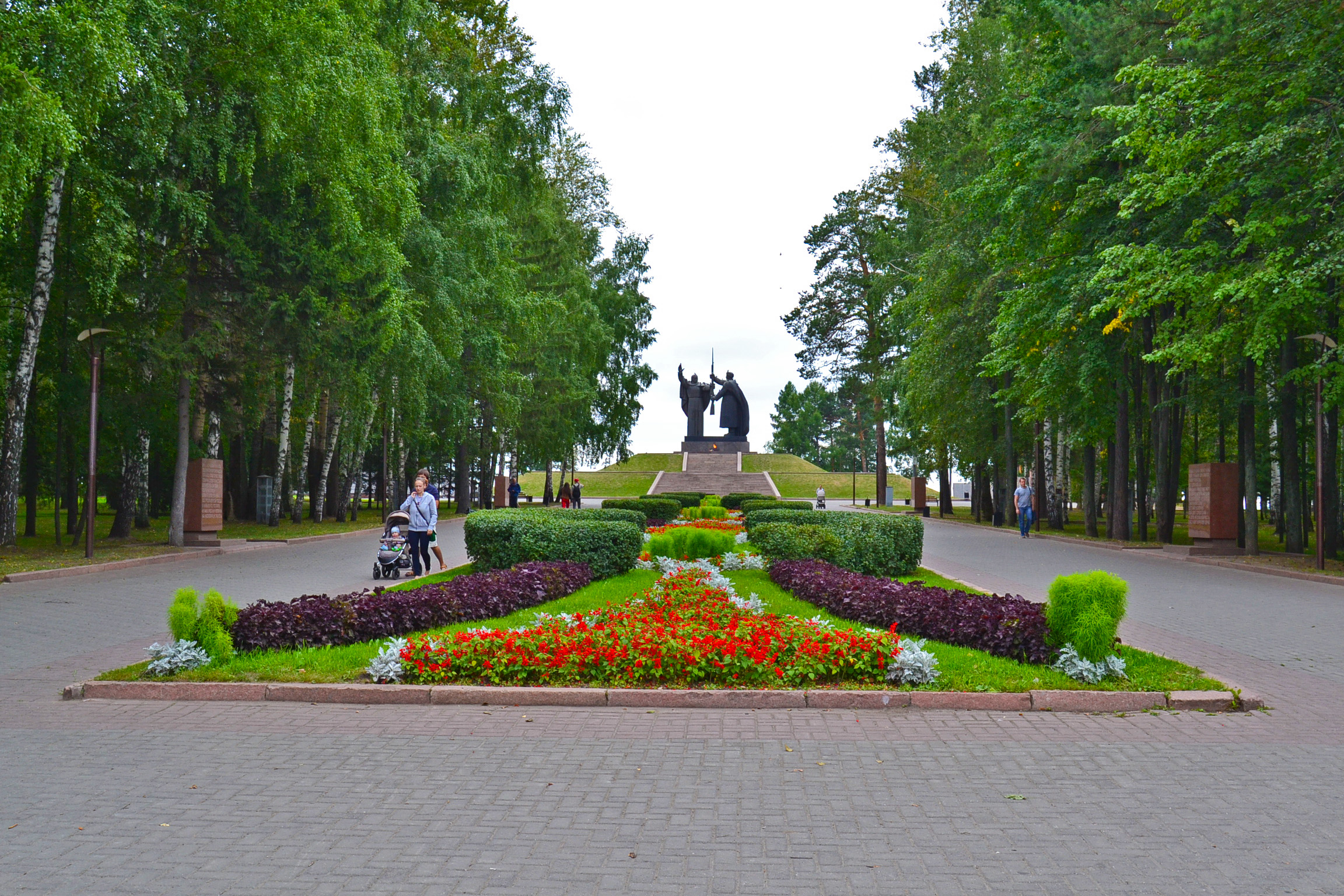 Лагерный сад в Томске, один из основных озеленителей Томска